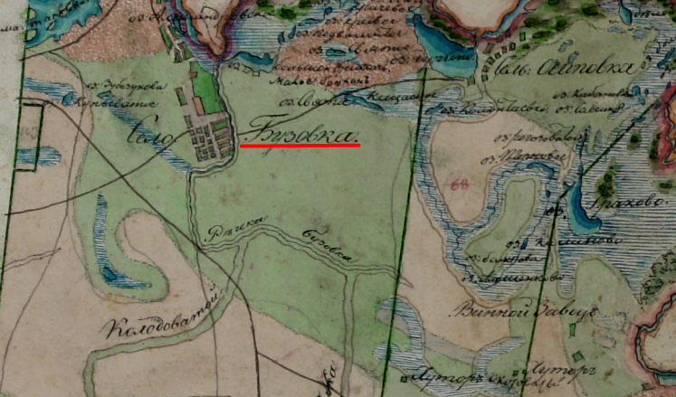 с.Бузівка, 1790р..